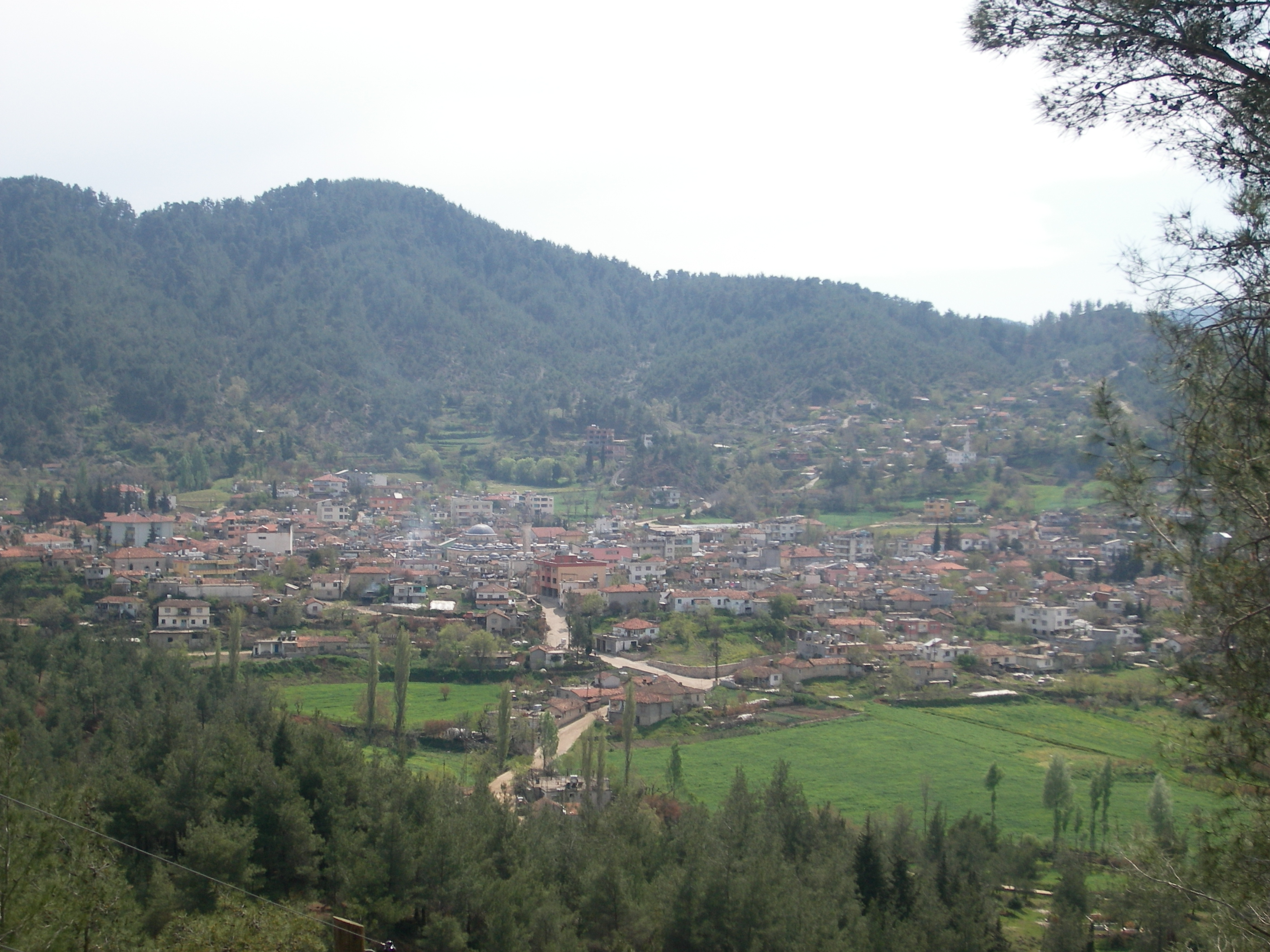 Yayladağı'nın genel görünümü